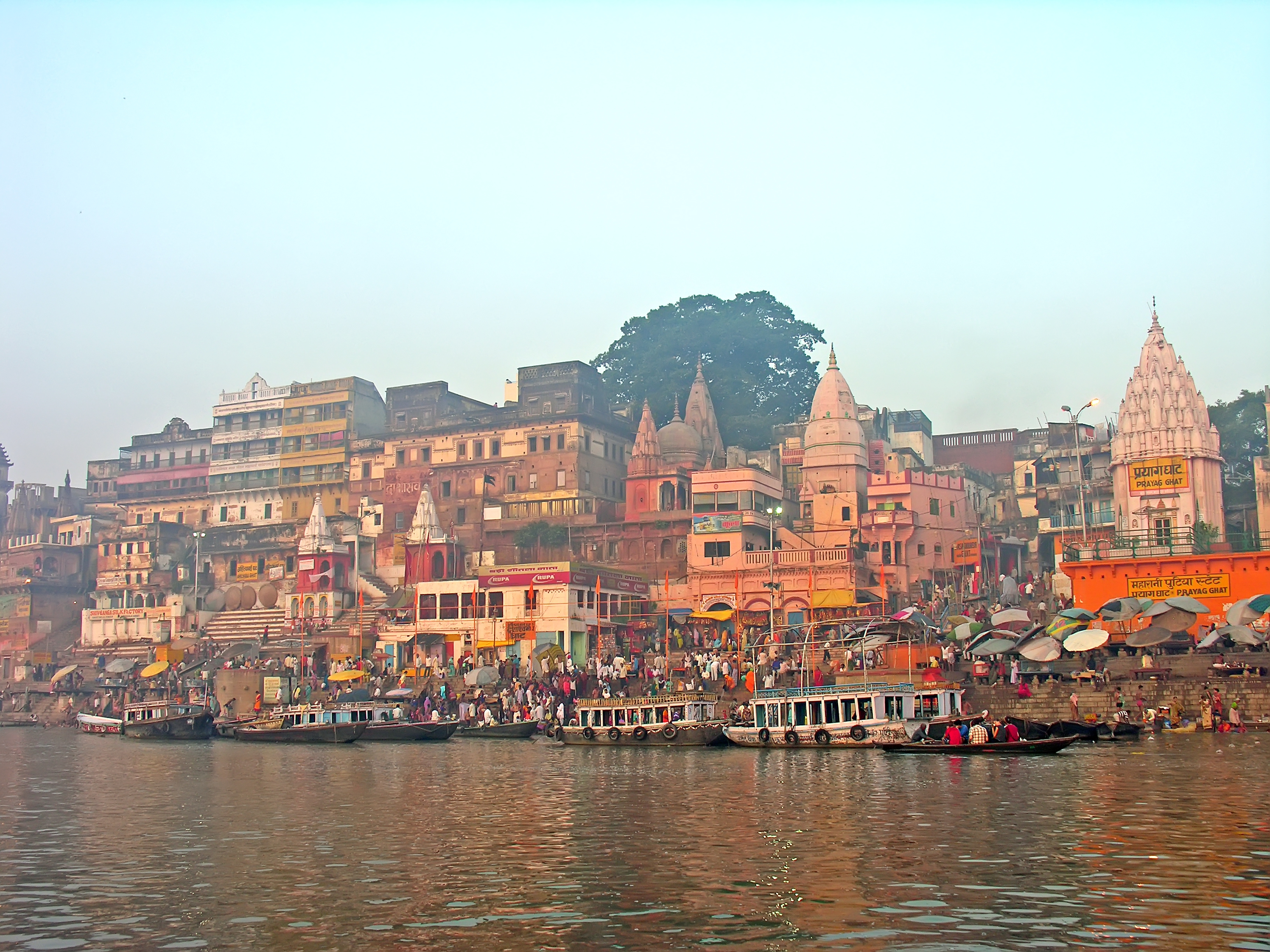 Ahilyabai, Dasaswamedh and Prayag Ghats